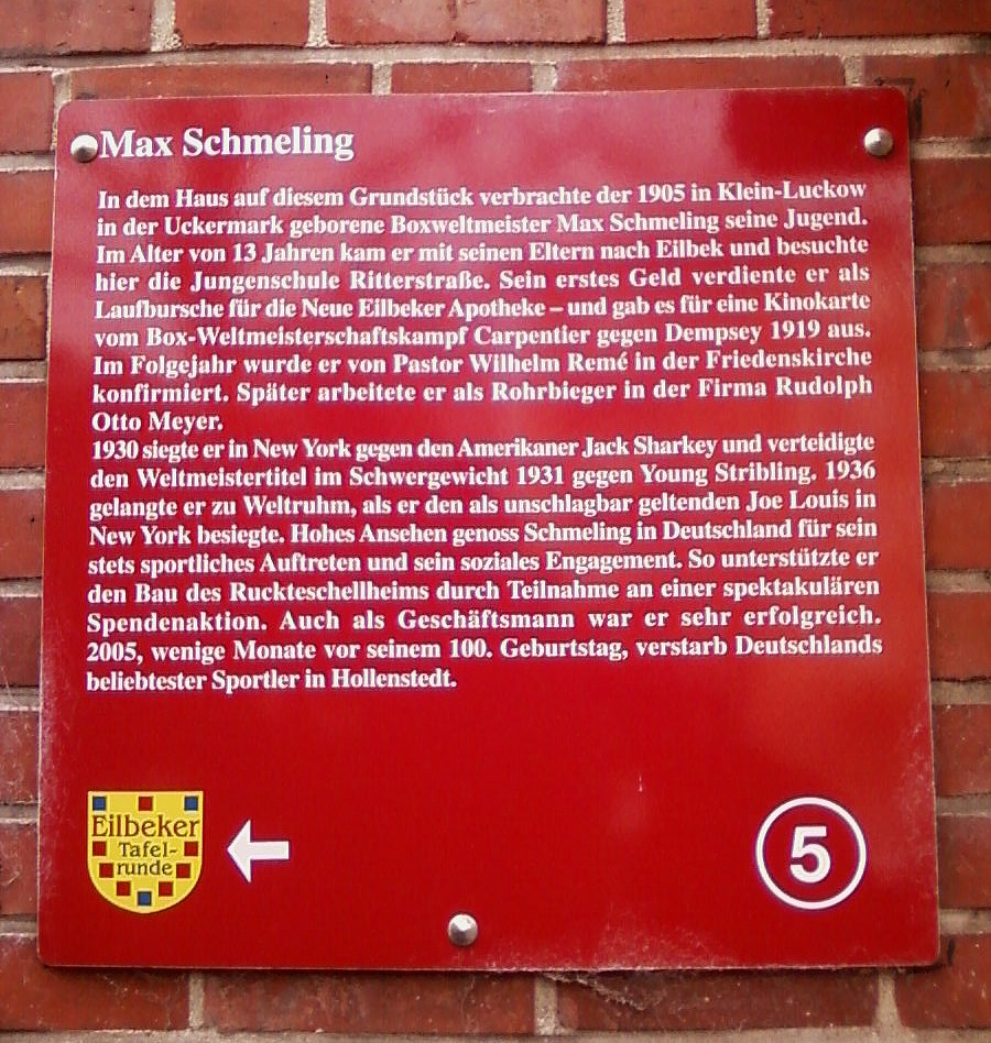 Eilbeker Tafelrunde Nr. 5 - Erinnerungstafel an den Boxer Max Schmeling am Haus Hasselbrookstraße 14 in Hamburg-Eilbek